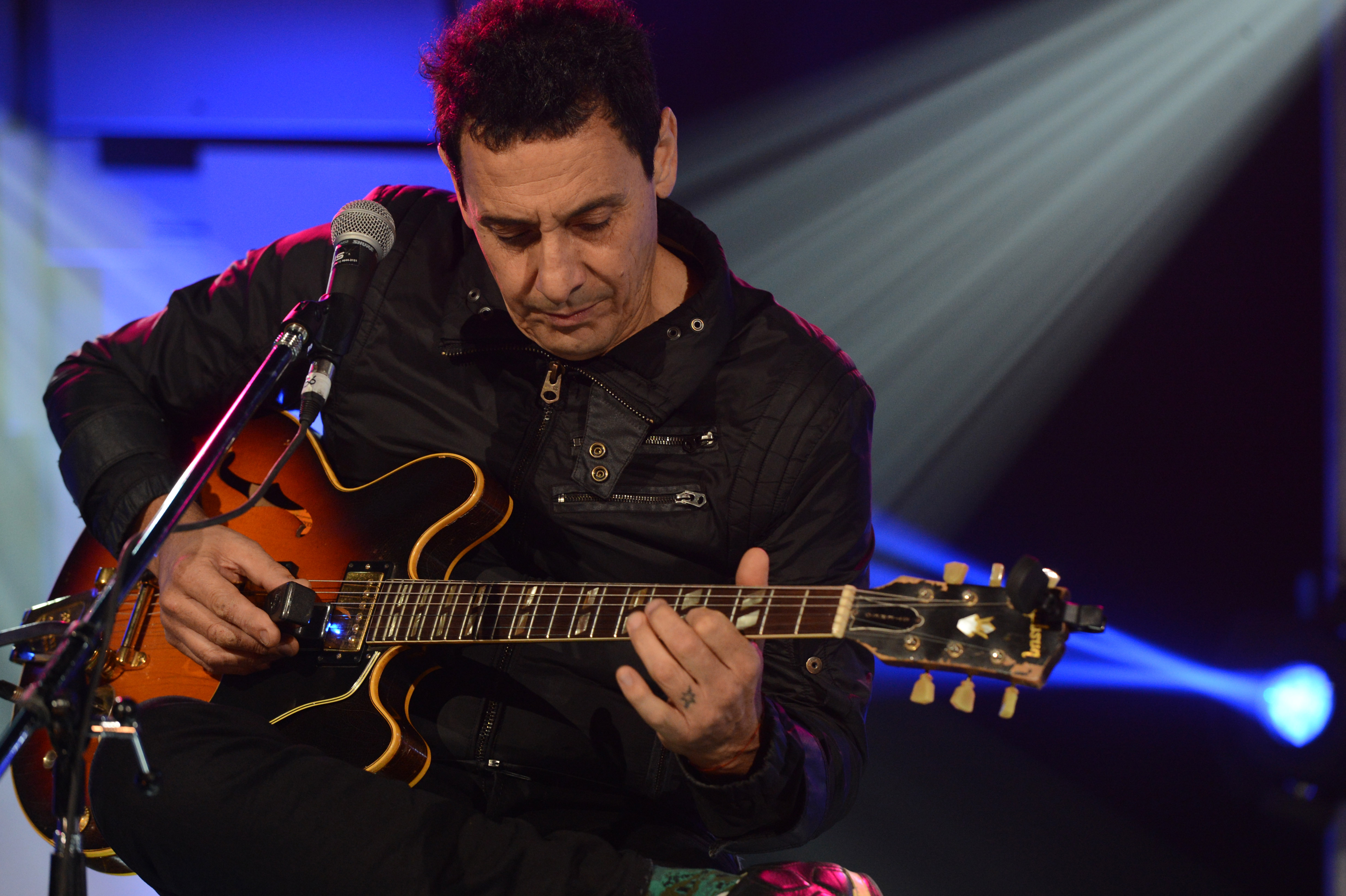 Ricardo mollo. Homenaje Gustavo Cerati. 04.11.2014. Foto TVP 2014